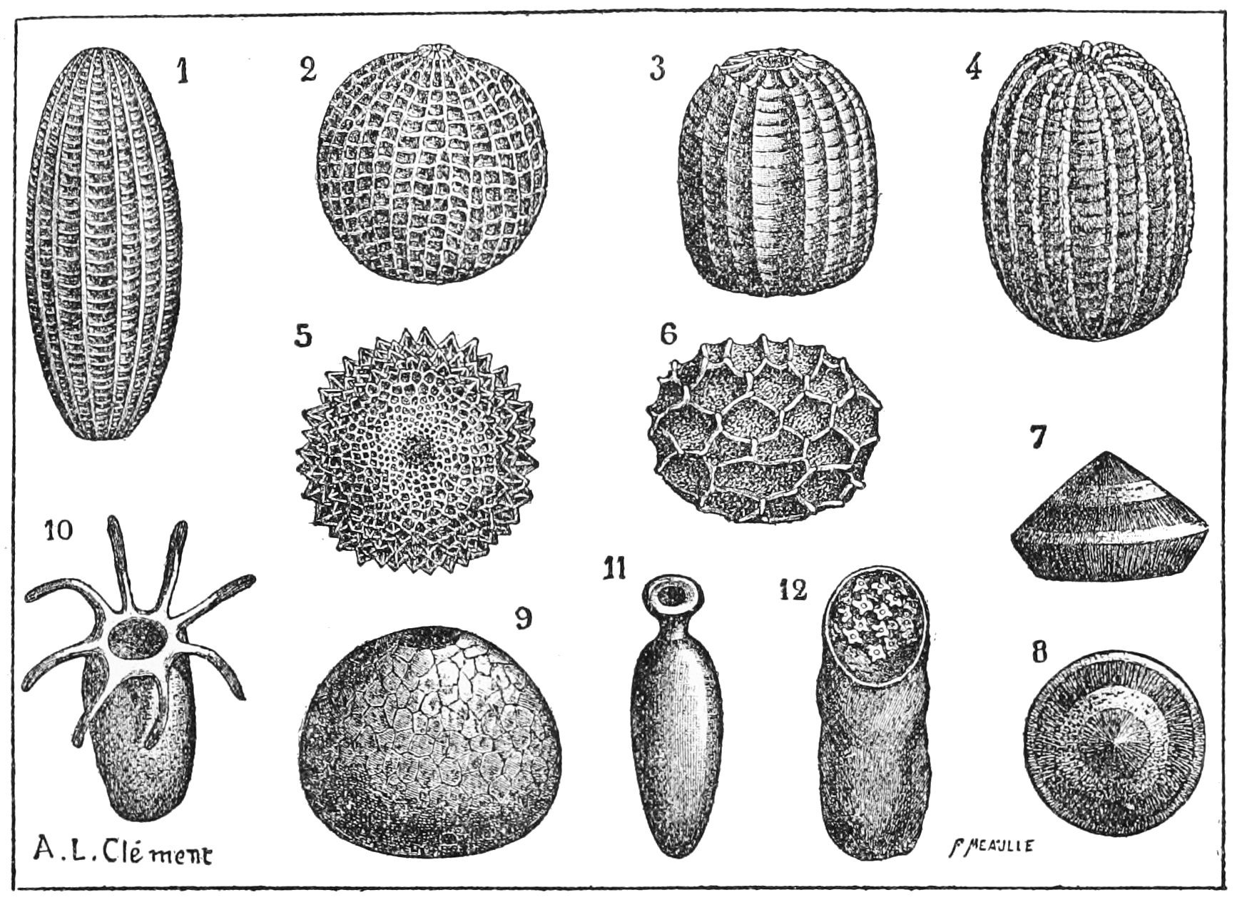 Insect eggs